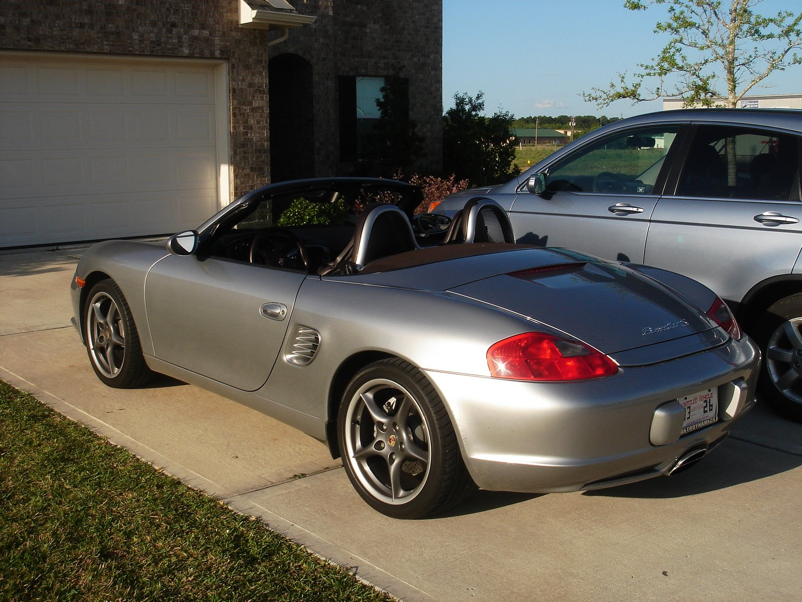 Photographer: Matthew Wolkenberg